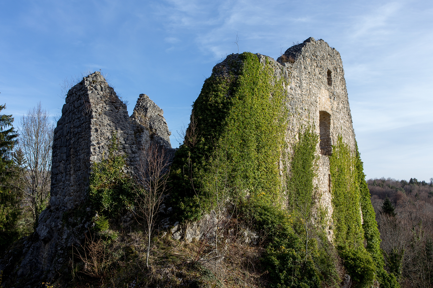 Burgruine Löwenburg bei Ederswiler, aber der Gemeinde Pleigne zugehörig